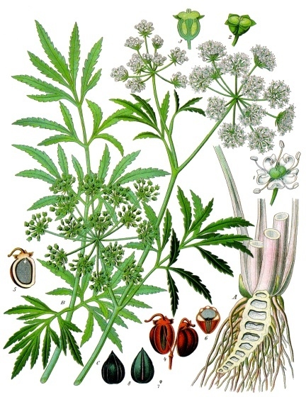 Wasserschierling. A Unterer Teil der Pflanze. B grundständiges Blatt. C Blütenzweig. 1 Blüte; 2 Fruchtknoten mit Griffelpolster; 3 derselbe im Querschnitt; 4 Früchte; 5 Frucht im Längsschnitt; 6 Frucht im Querschnitt; 7 Frucht von der Bauchseite; 8 dieselbe vom Rücken. A B C natürliche Grösse, 1—8 vergrössert.